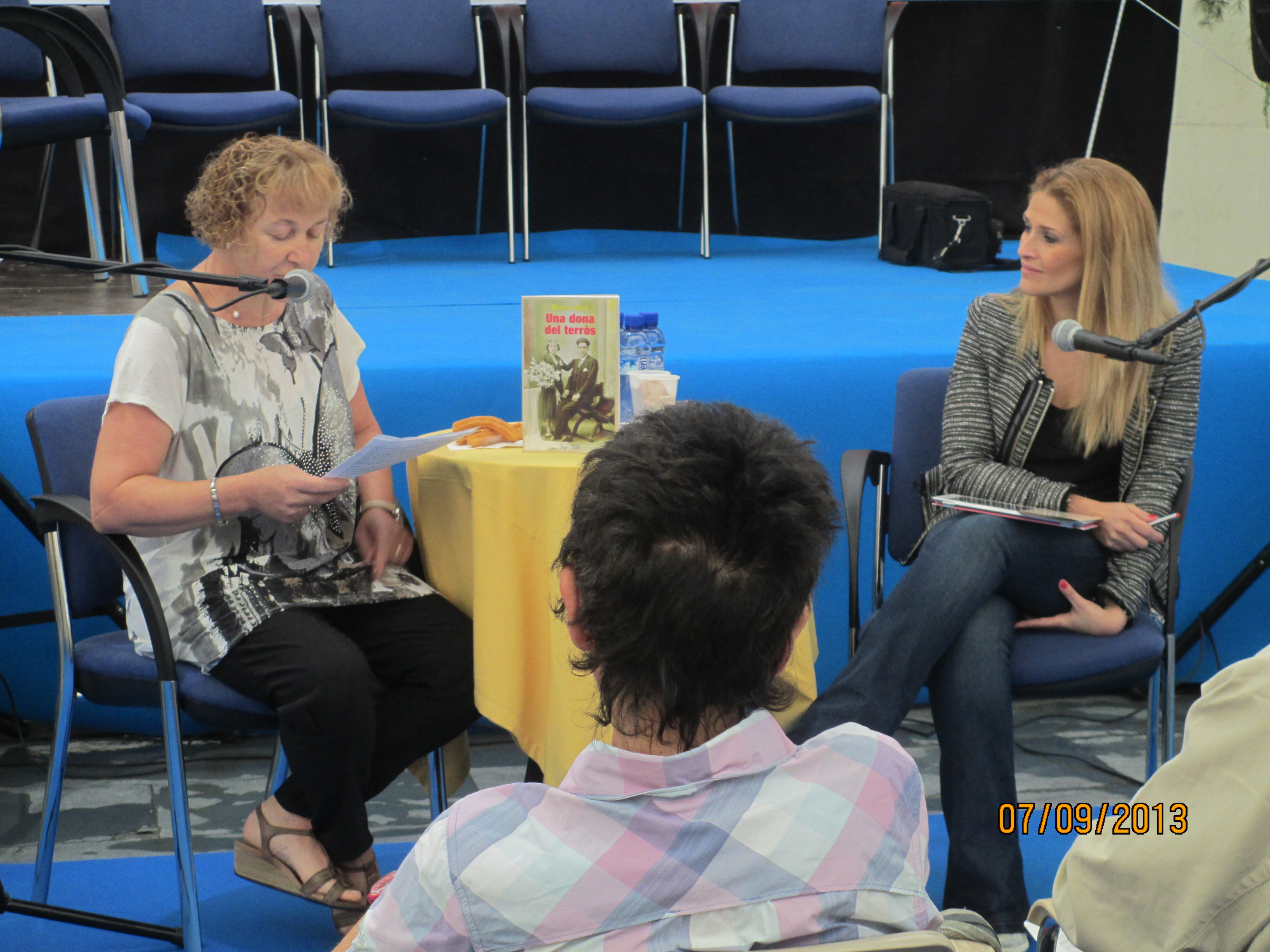 Entrevista a Roser Guix a Organyà